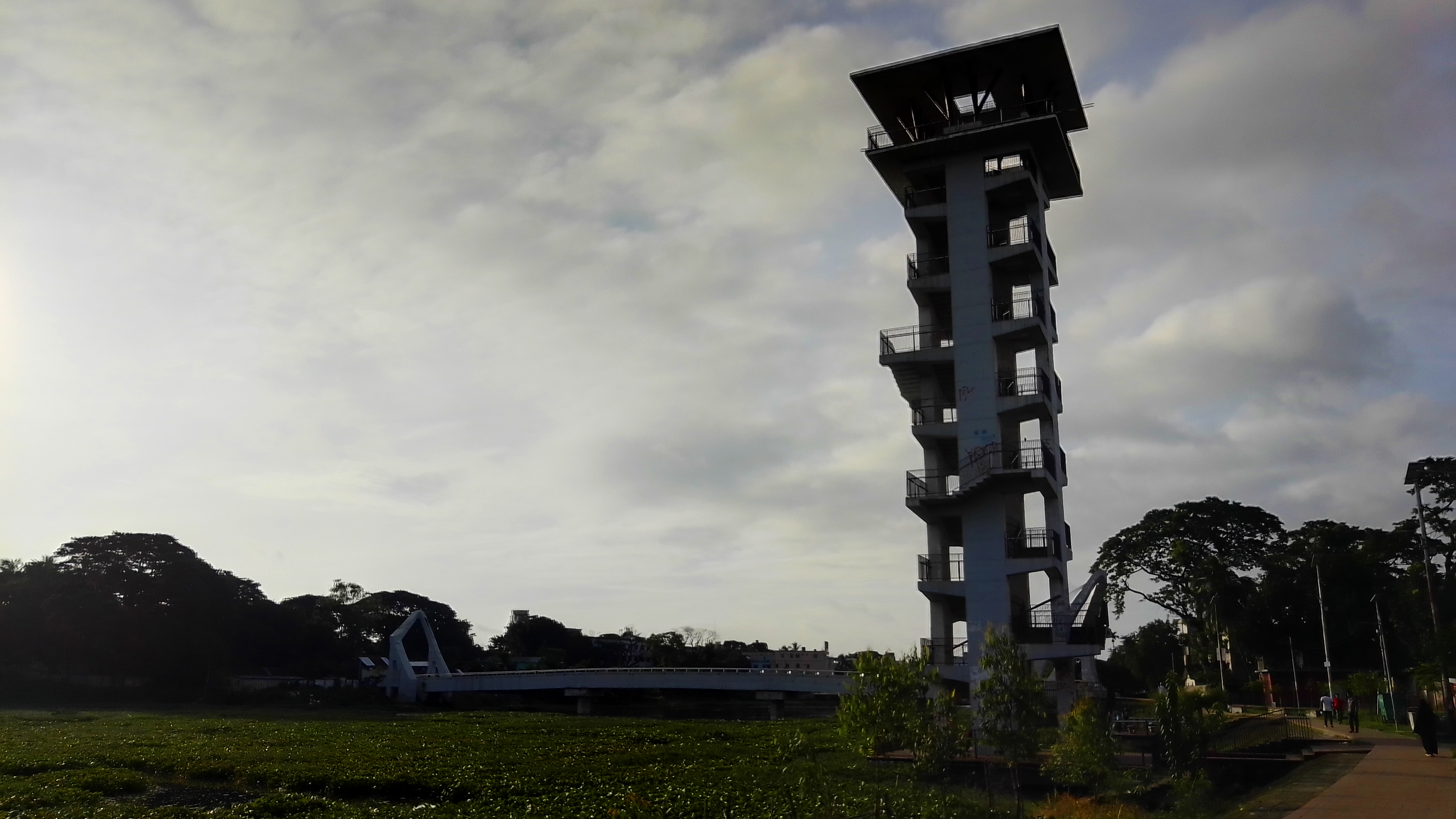 গুরুদয়াল সরকারি কলেজের ওয়াচ টাওয়ার। আলোকচিত্র : শাওন ভাই।